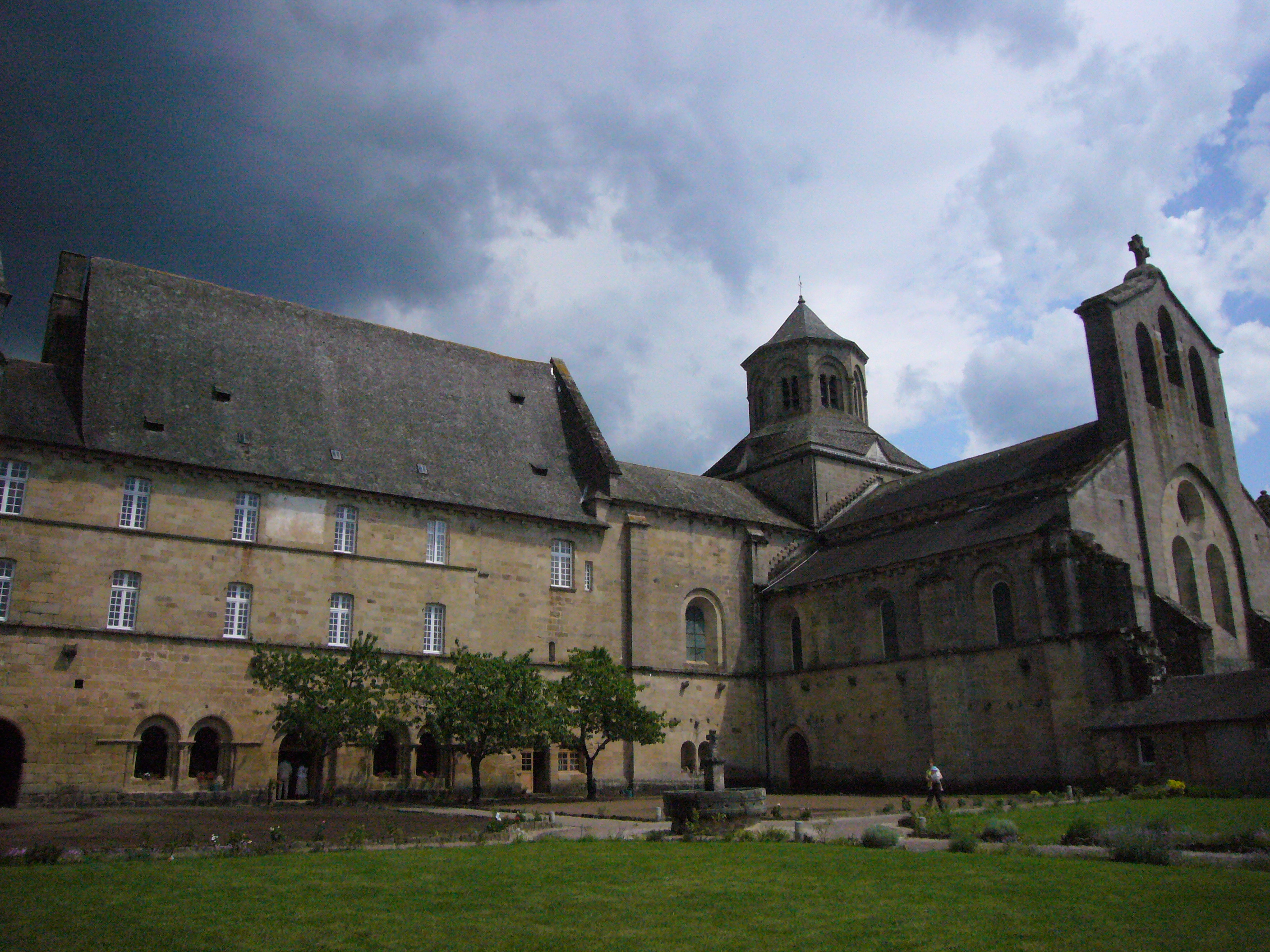 Église abbatiale et monastère d'Aubazine, Corrèze, France